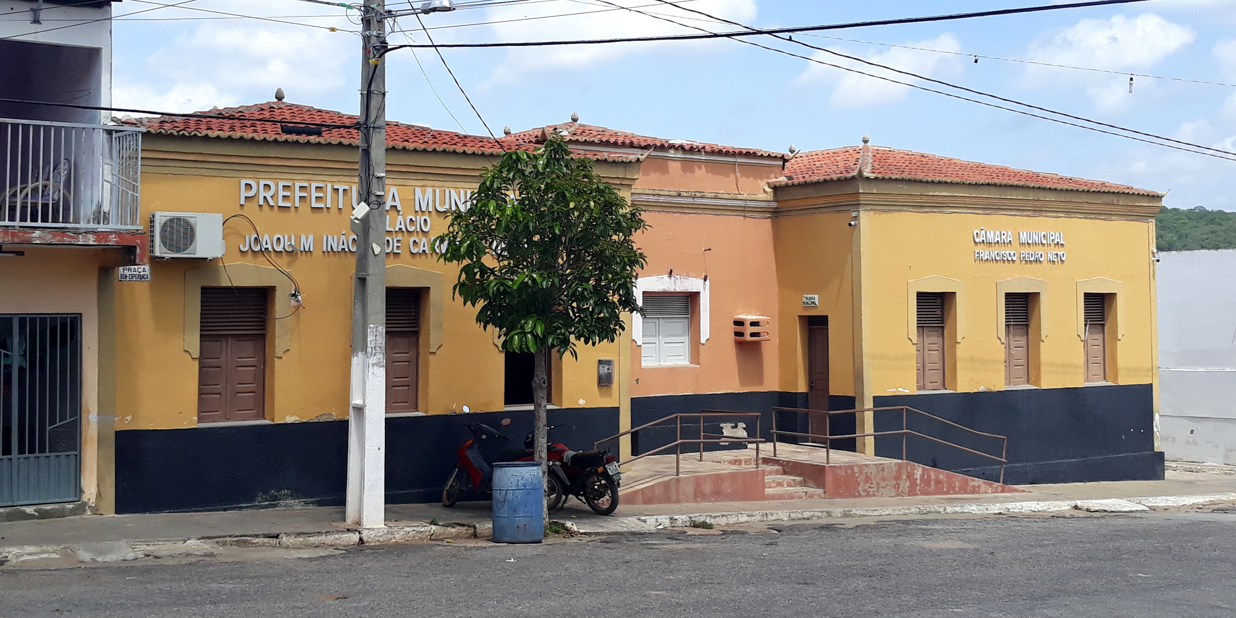 Palácios Joaquim Inácio de Carvalho Neto (prefeitura, à esquerda) e Francisco Pedro Neto (câmara de vereadores, à direita), sedes dos poderes executivo e legislativo de Antônio Martins, Rio Grande do Norte (Brasil).